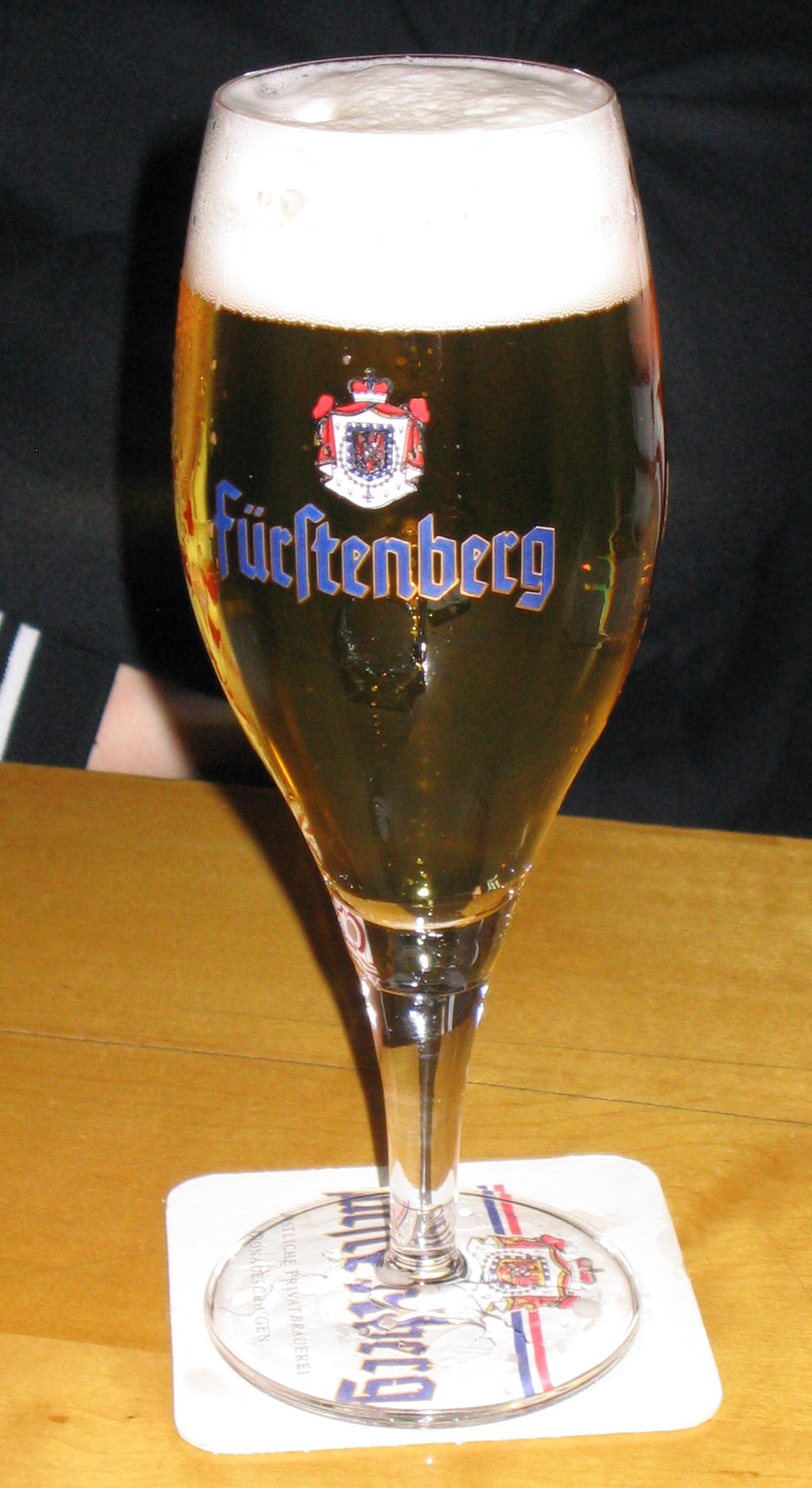 Ein Glas Fürstenberg-Bier